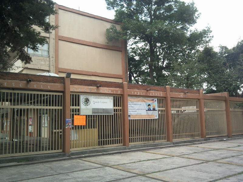 Ejemplo de una escuela de educacion media (secundaria)ubicada en la delegacion Tlalpan, en el Distrito Federal